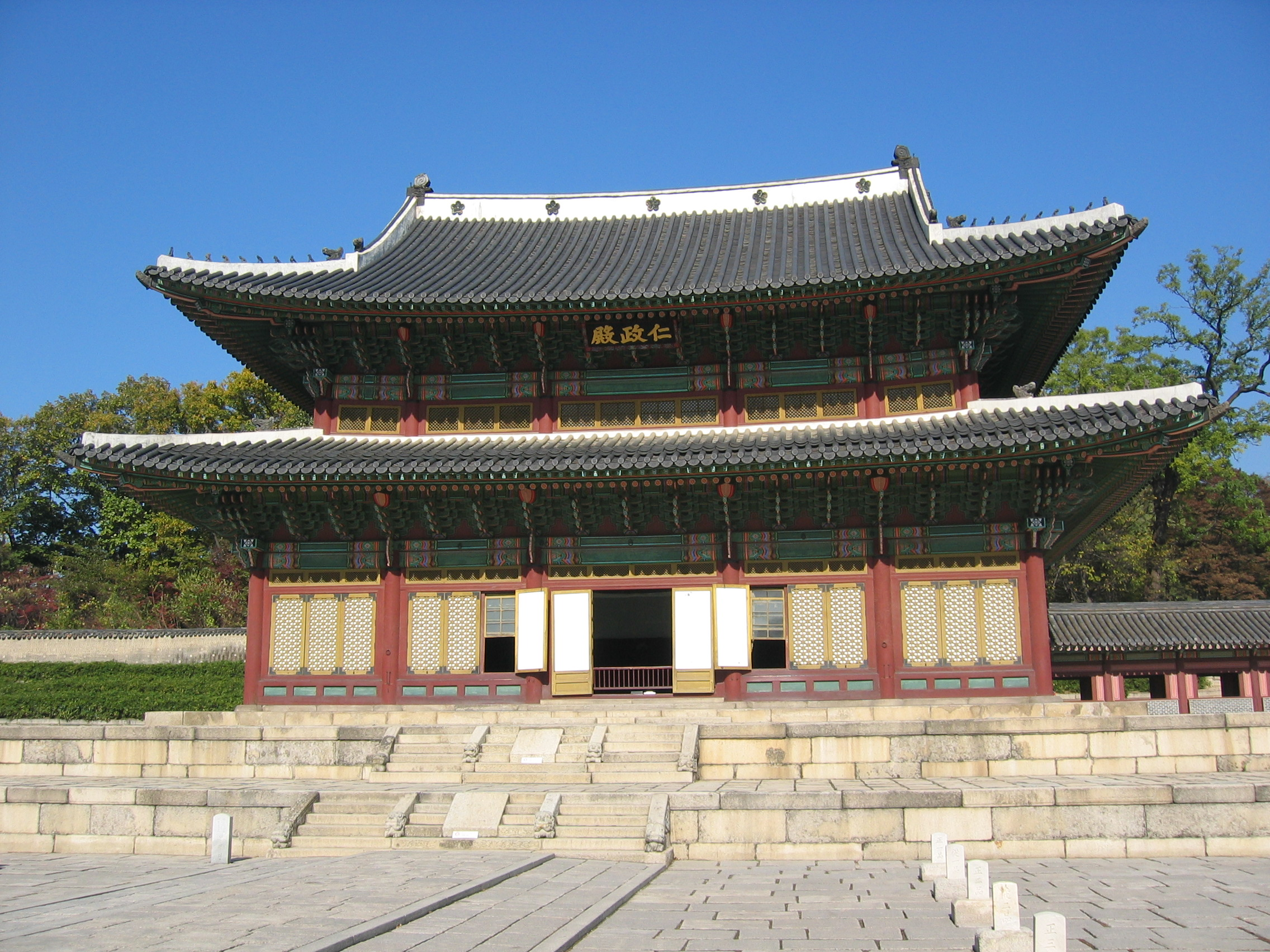 Changdeokgung in Seoul - 창덕궁